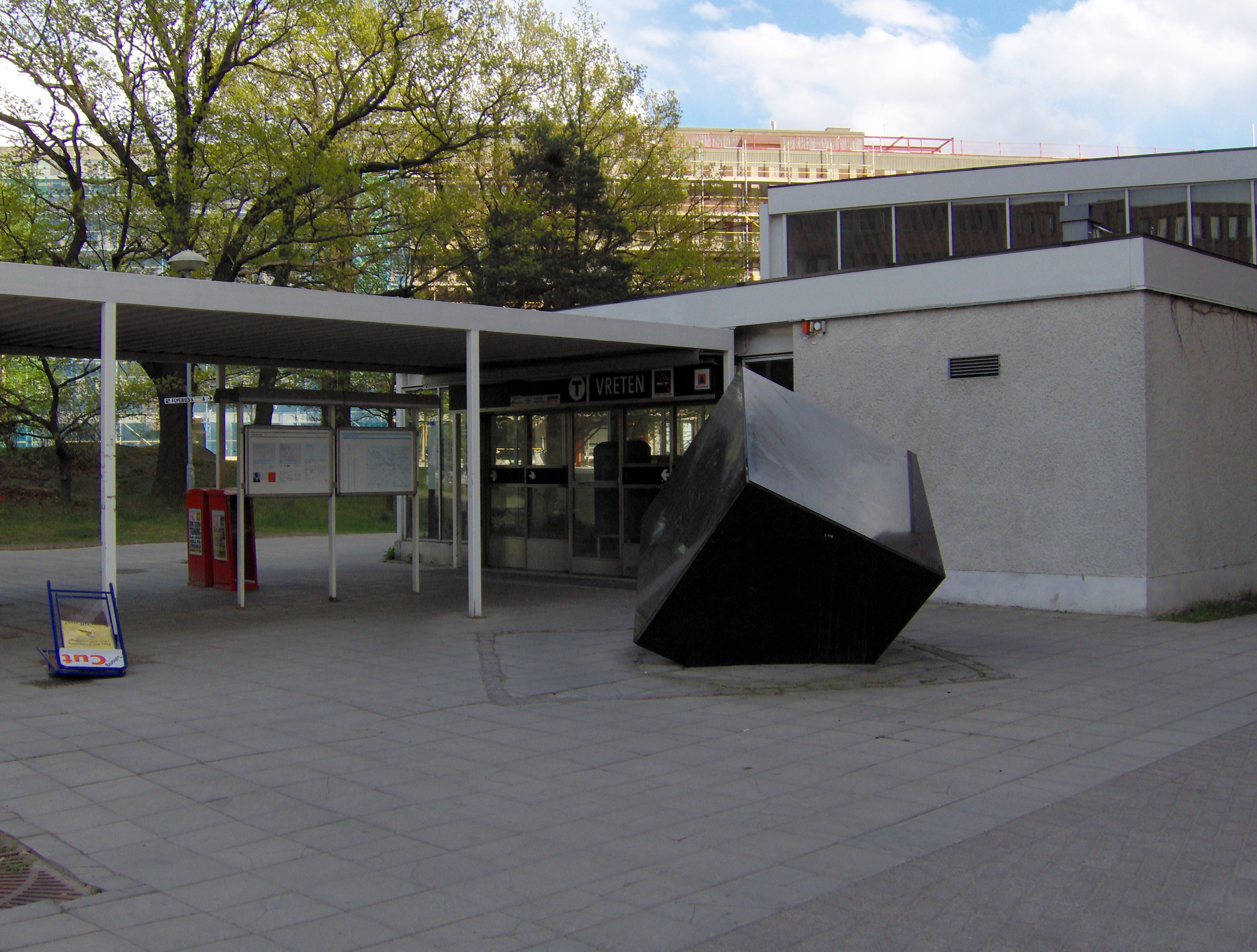 Outside Stockholm metro station Vreten.